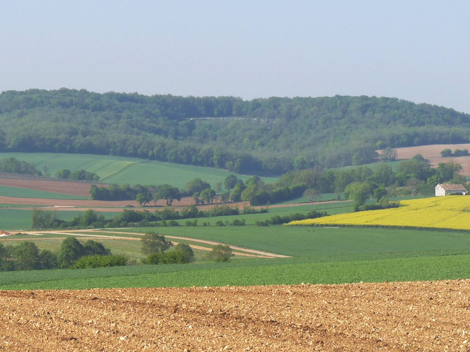 Le théâtre des Bouchauds vu de Genac, Charente, France. Terre de groie et cuesta du Jurassique